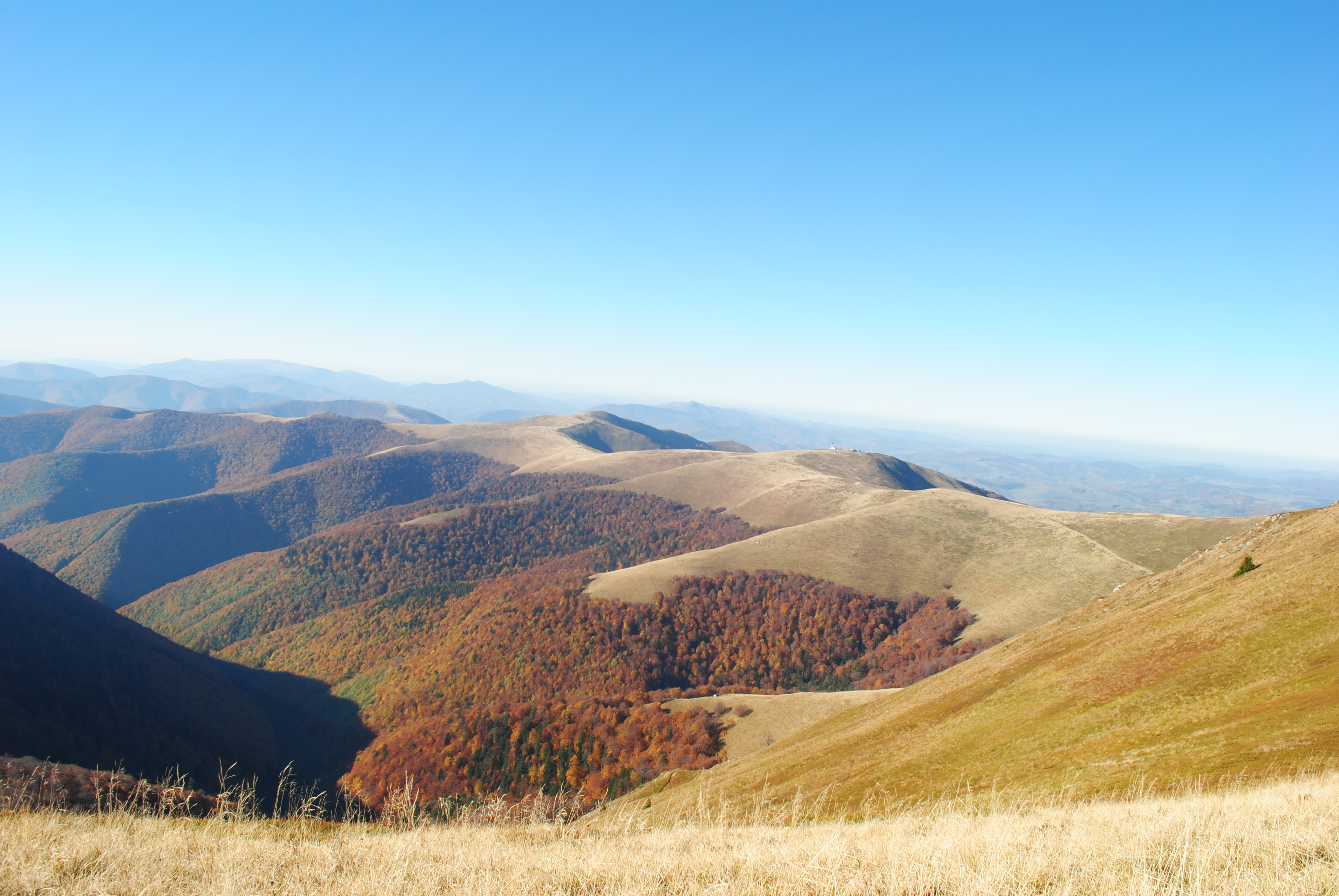 «Боржава», Виноградівський р-н ДП «Виноградівське ЛГ», Шаланківське л-во, квартал 1 (виділ 1-10), квартал 4 (виділ 1-9), квартал 7 (виділ 1-7), квартал 11 (виділ 1-7, 32, 33), квартал 14 (виділ 1-11)